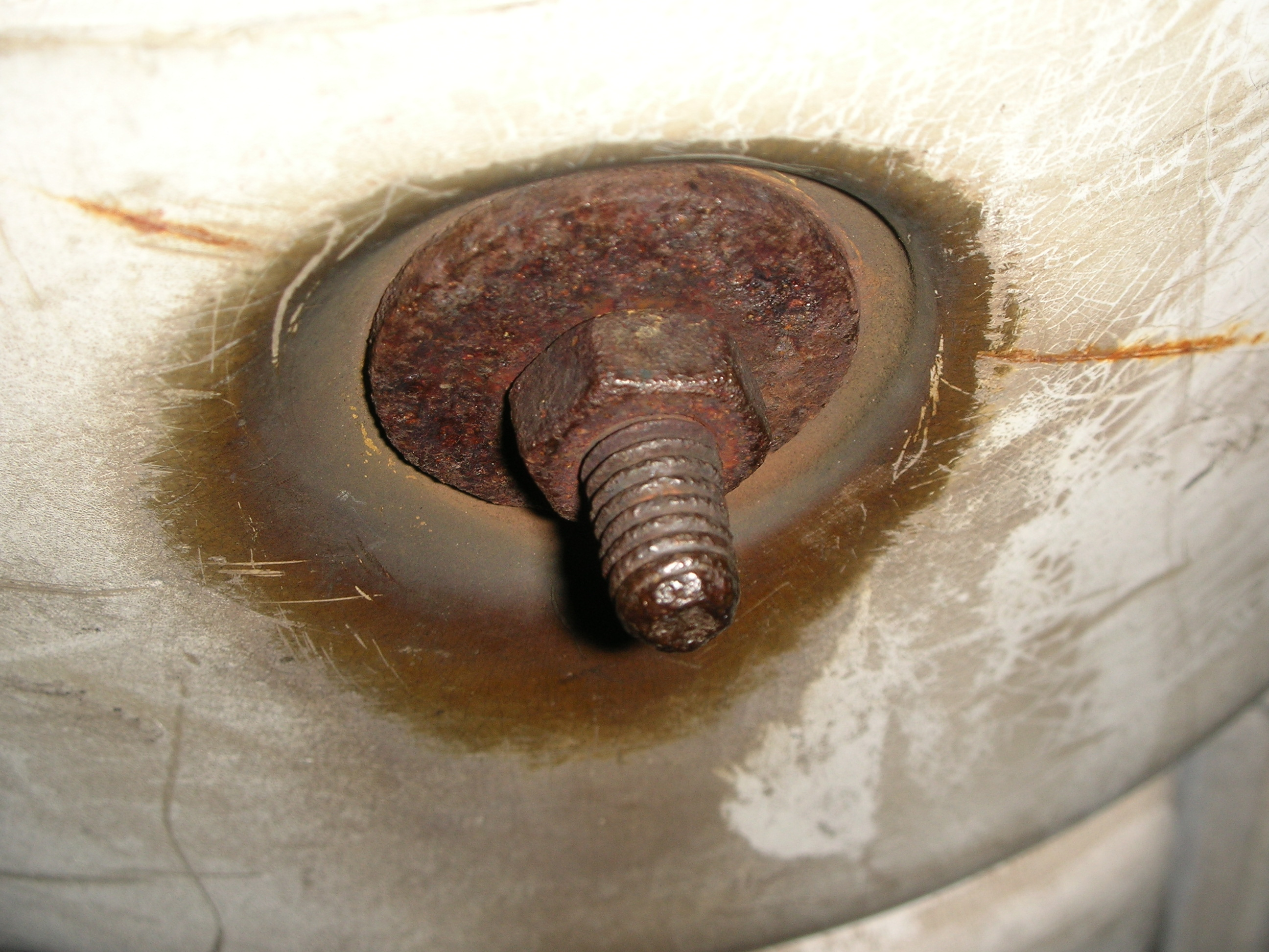 Schraubverbindung, stark korrodiert, im Freien, an einem Mast